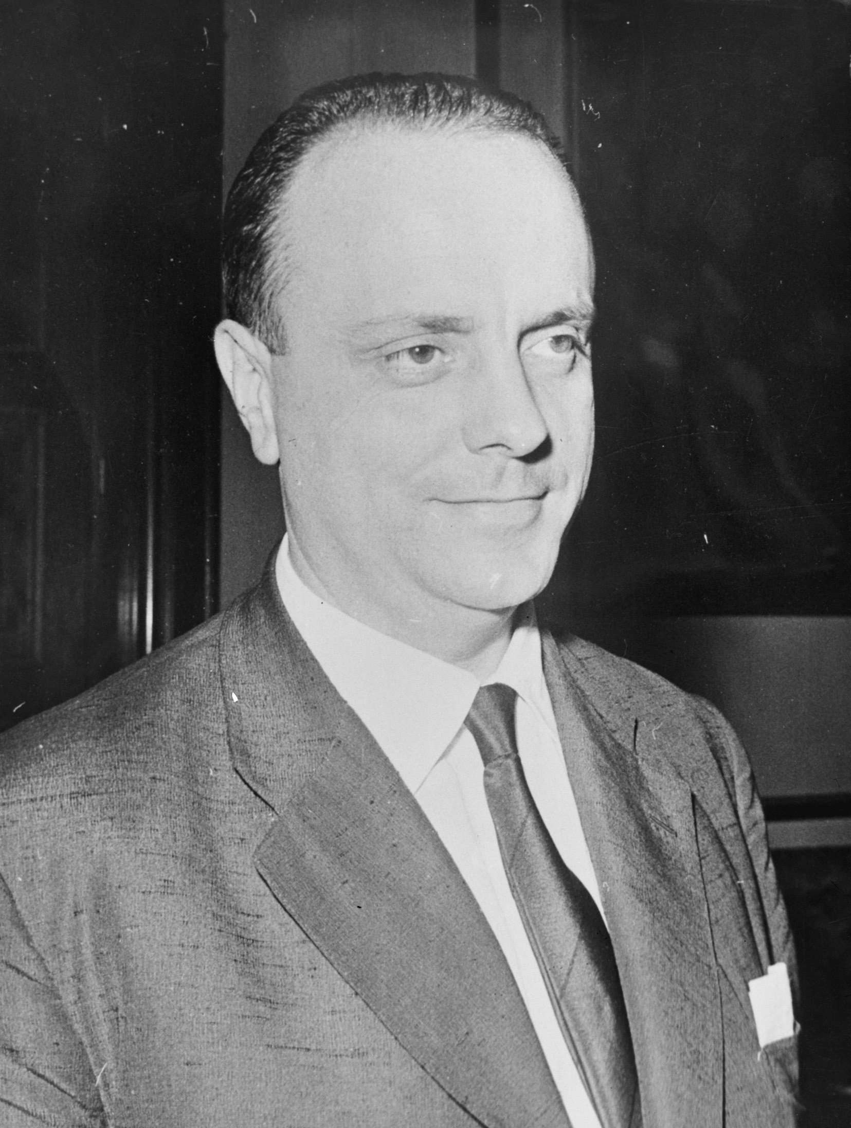 Collectie / Archief : Fotocollectie Anefo Reportage / Serie : [ onbekend ] Beschrijving : Mr. Manuel Fraga Iribarne (Spaanse minister) Datum : 21 februari 1963 Locatie : Spanje Trefwoorden : ministers Fotograaf : [onbekend] Auteursrechthebbende : Nationaal Archief Materiaalsoort : Negatief (zwart/wit) Nummer archiefinventaris : bekijk toegang 2.24.01.04 Bestanddeelnummer : 914-8477